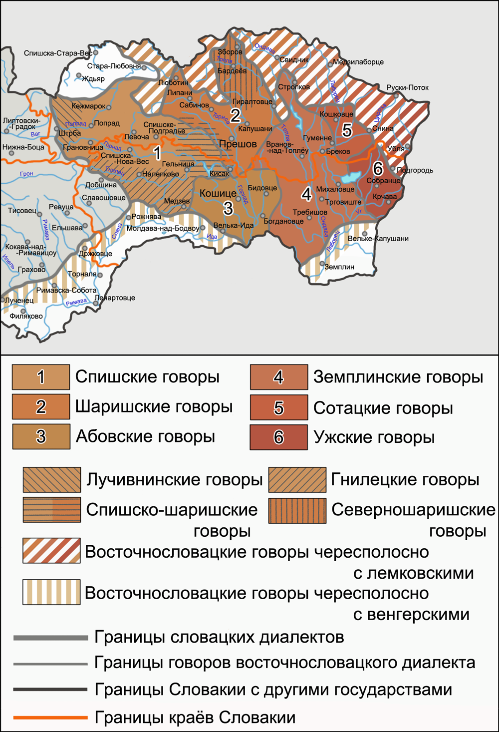 Карта говоров восточнословацкого диалекта. Источники: Slovake.eu. Úvod. O jazyku. Nárečia Short D. Slovak // The Slavonic Languages / Edited by Comrie B., Corbett G. — London, New York: Routledge, 1993. — p. 590. — ISBN 0-415-04755-2 Uniza.sk. Slovenský jazyk a nárečia Slovenský ľudový umelecký kolektív. Obyvateľstvo a tradičné oblasti. Slovenčina